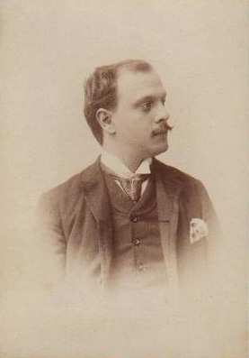 Stanislao Gastaldon, fotografia originale circa 1890-1910